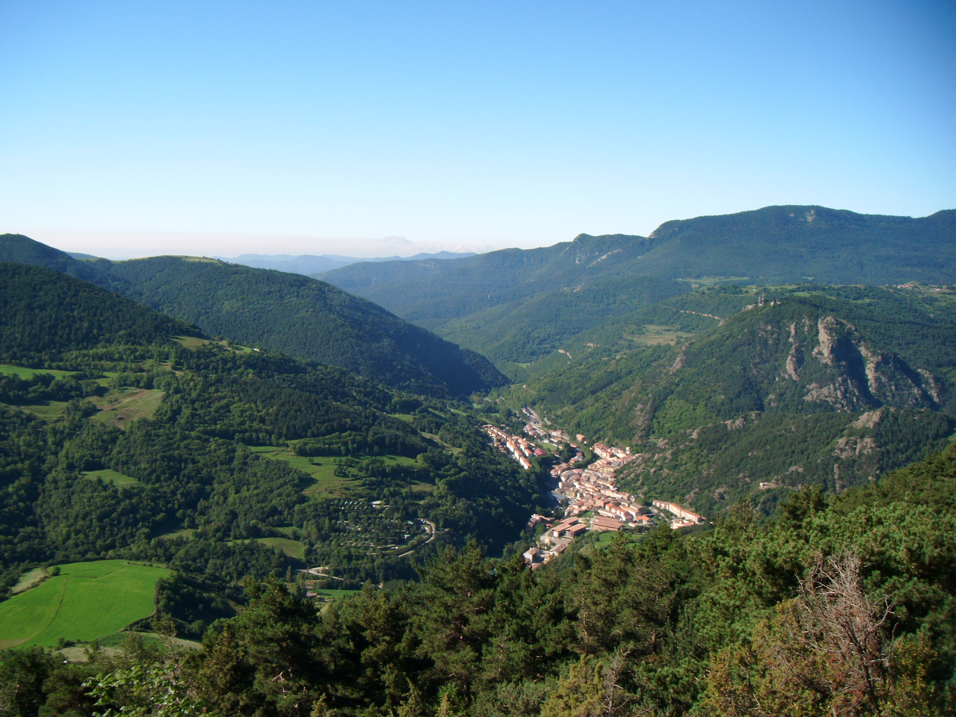 Vista de la Vall de Ribes des de Ribes Altes